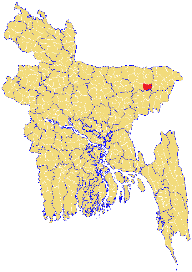 Map of Jagannathpur upazila in Sunamganj, Bangladesh.